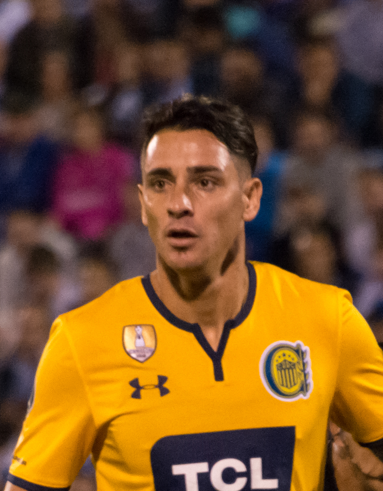 Fernando Zampedri, Universidad Católica v Rosario Central, Estadio San Carlos de Apoquindo, Las Condes, Santiago, Chile.